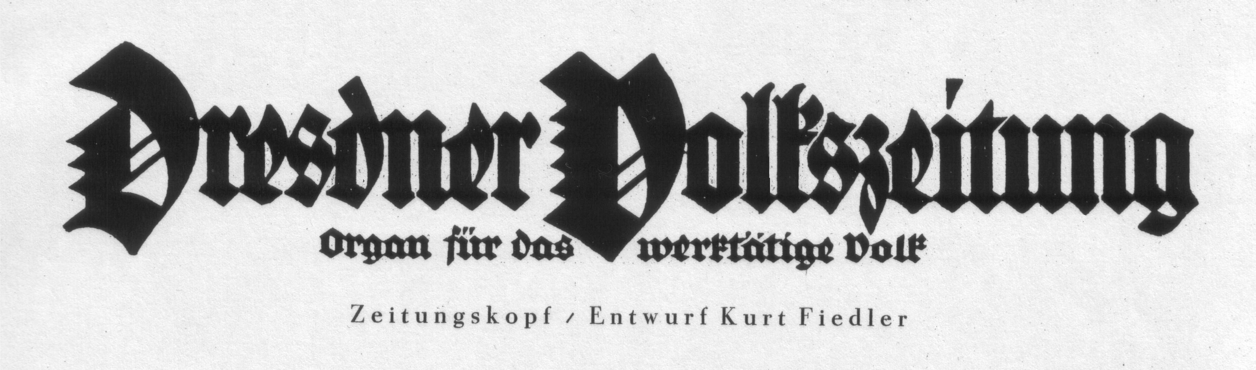 Entwurf des Zeitungskopfes der Dresdner Volkszeitung